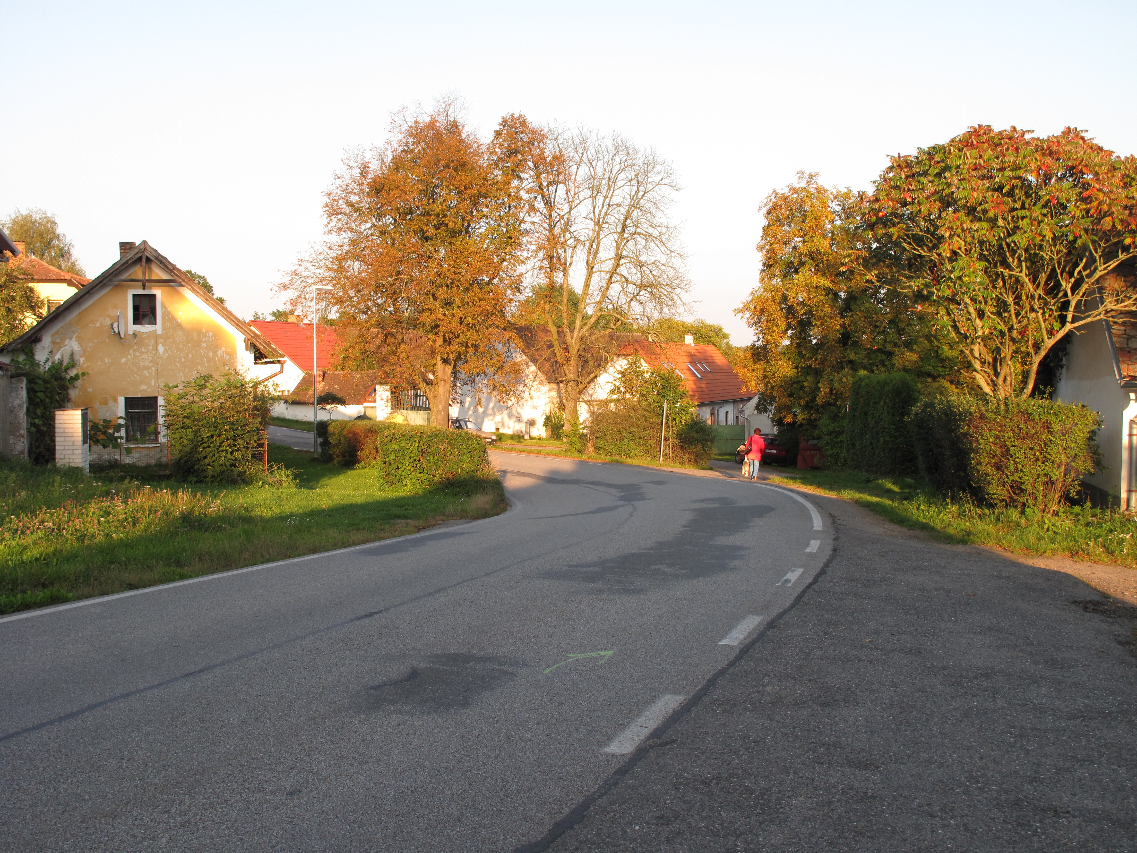 Zatáčka ve Vahlovicích. Okres Strakonice, Česká republika.